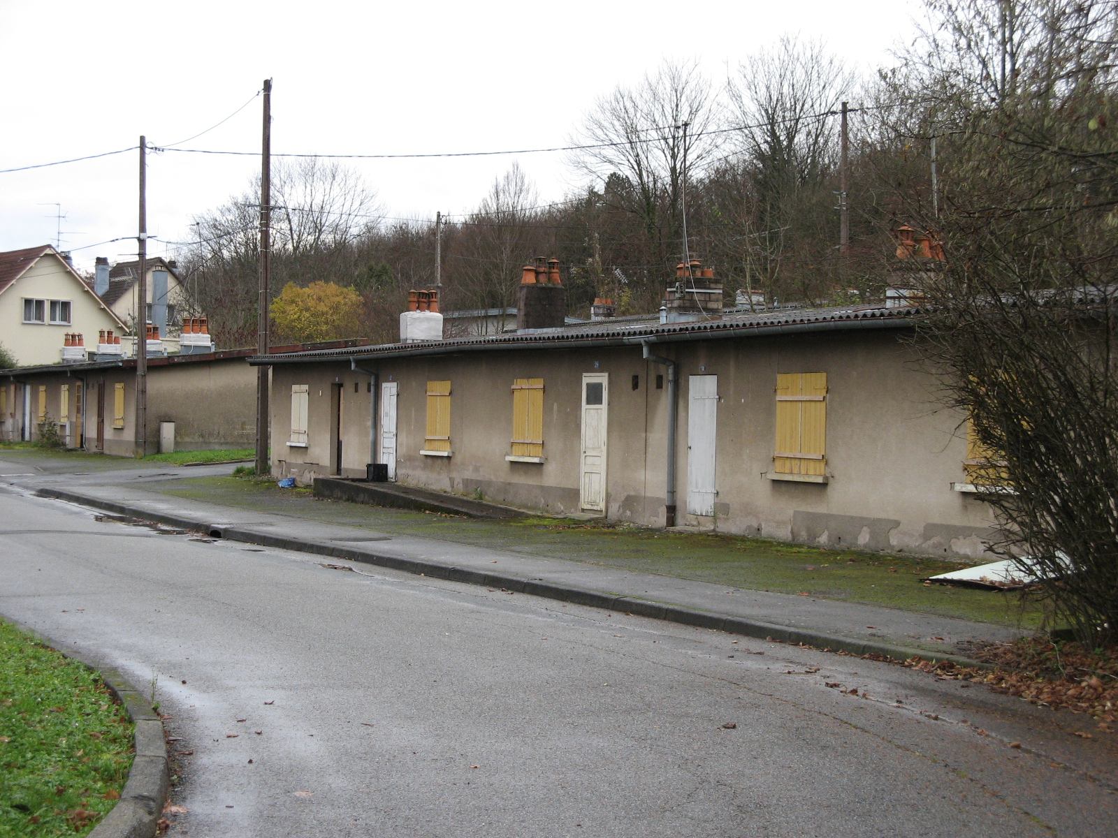 La Chiffogne Cité d'urgence 2006